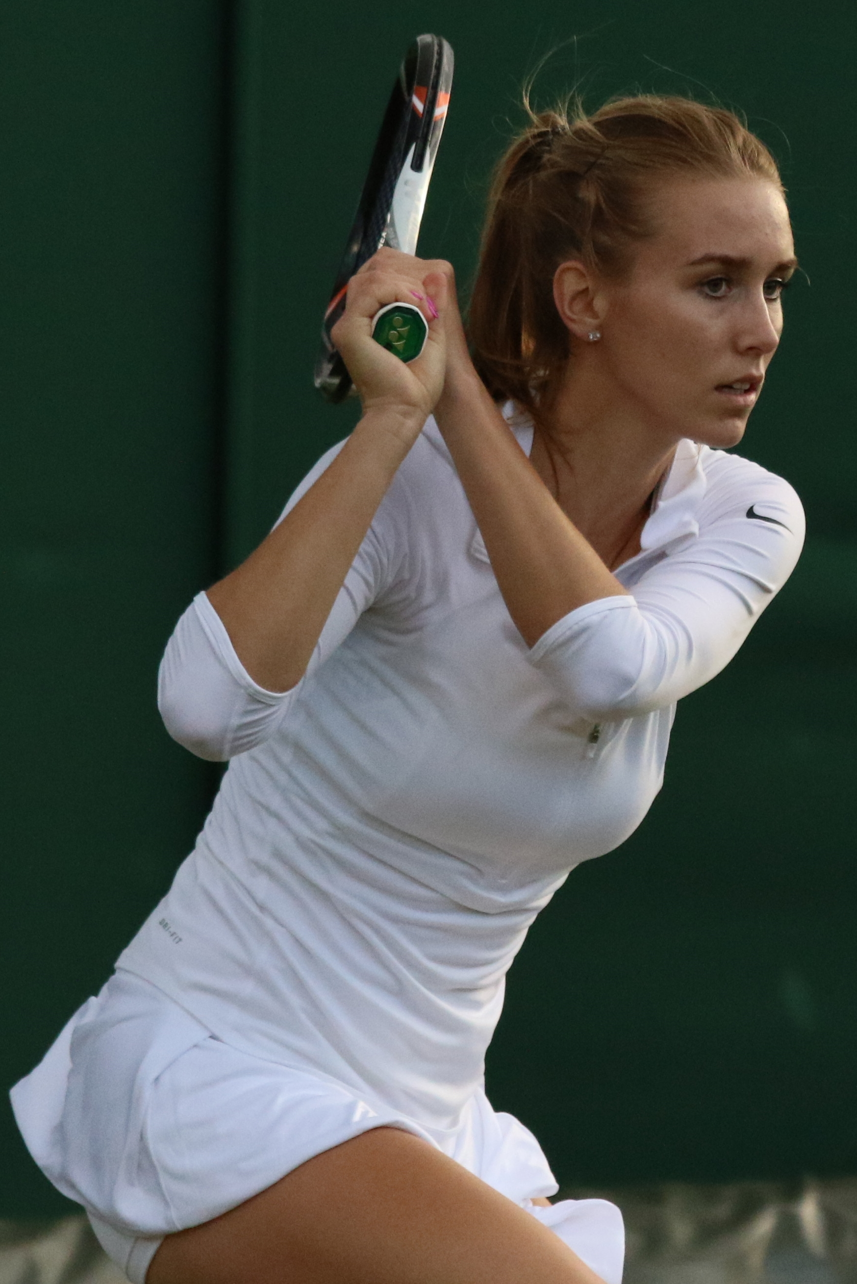 Stefkova WMQ16 (17)